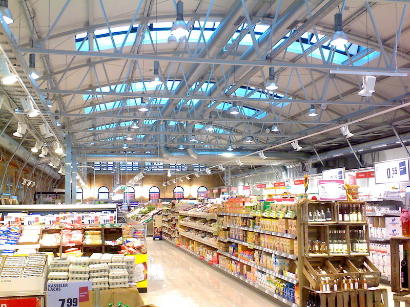 Innenansicht östliche Halle Tramdepot Sachsenhausen Frankfurt am Main